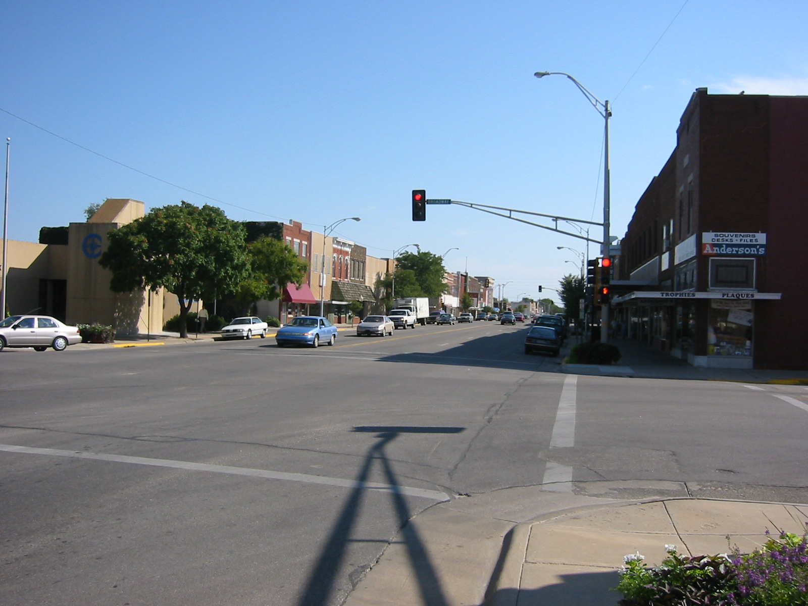 Main Street in Newton, Kansas. Taken in September 2003.